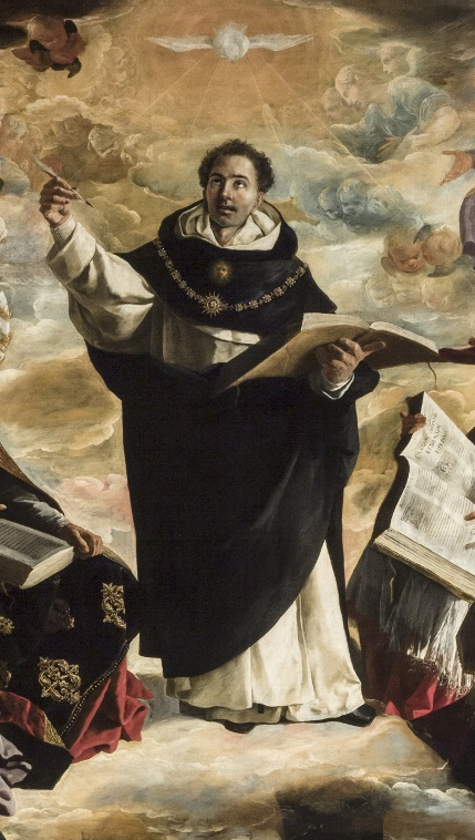 Dettaglio dal Trionfo di San Tommaso d'Aquino di Francisco de Zurbarán